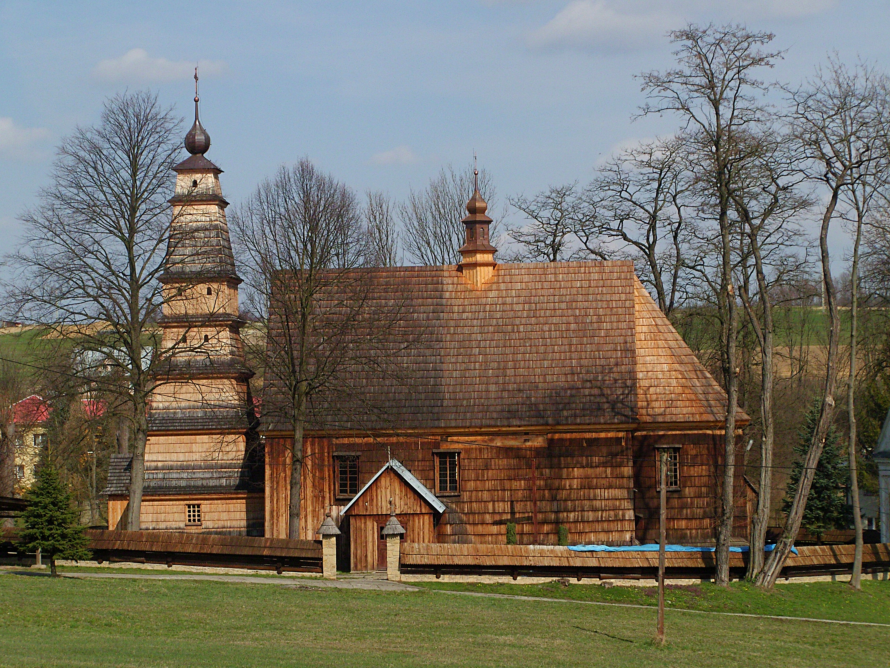 Kościół św. Andrzeja Apostoła w Rożnowicach; z lat 50. XVIII wieku. Obiekt ze Szlaku Architektury Drewnianej województwa małopolskiego